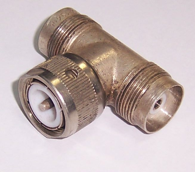 Несогласованный коаксиальный тройник с каналом тип IV